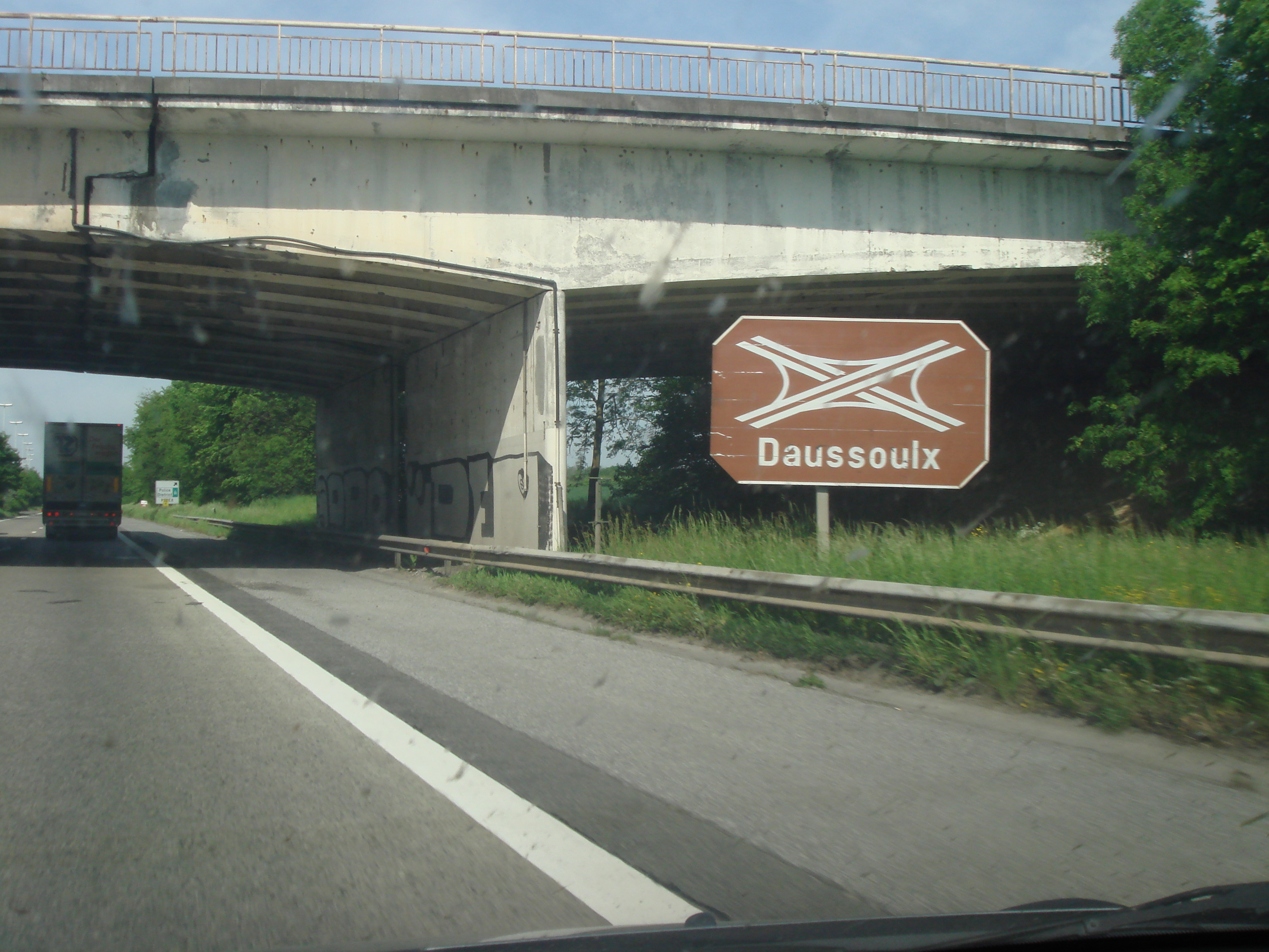 Echangeur Daussoulx en Belgique, croisement entre l'E42 et l'E411